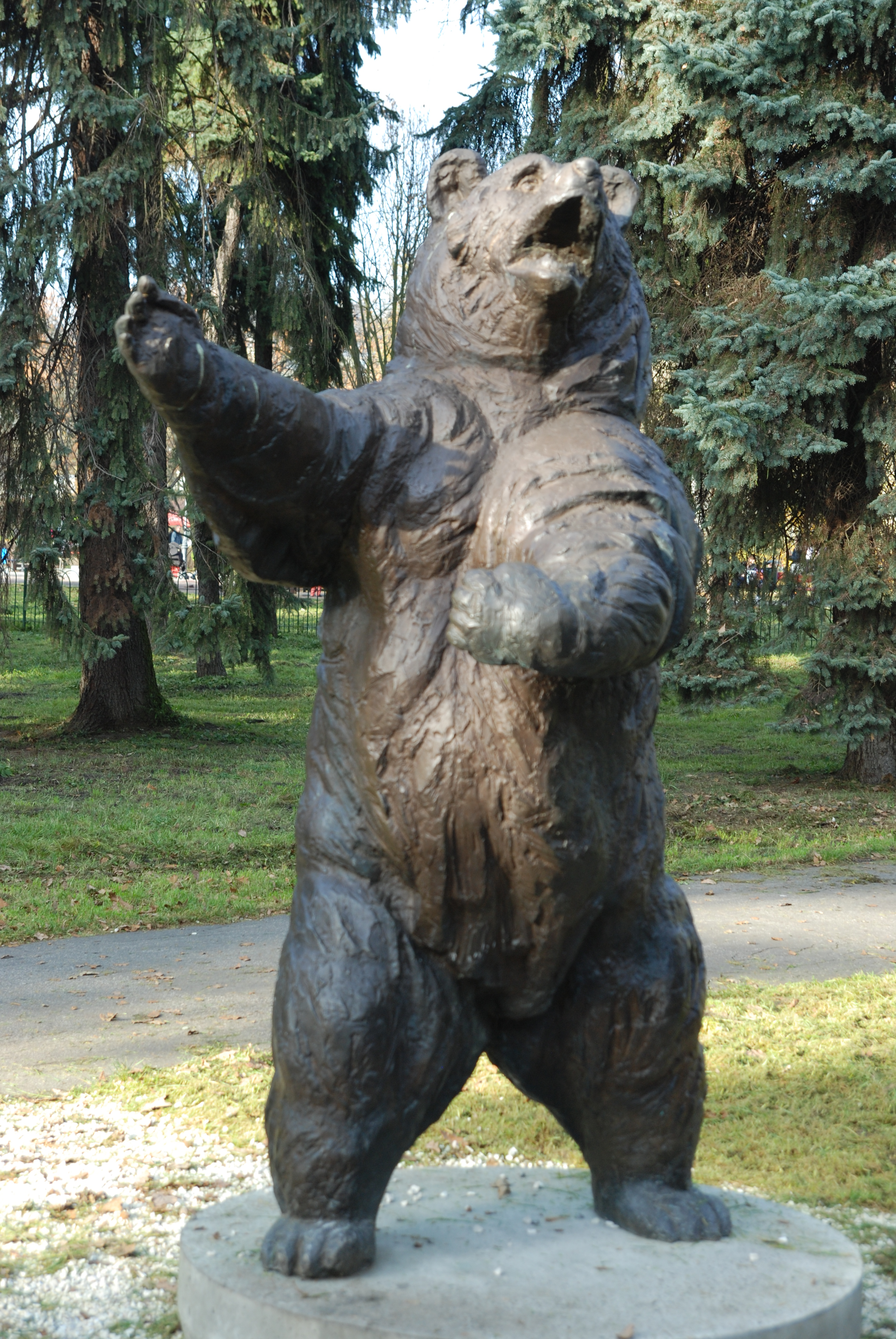 Pomnik Niedźwiedzia Wojtka w krakowskim Parku Jordana